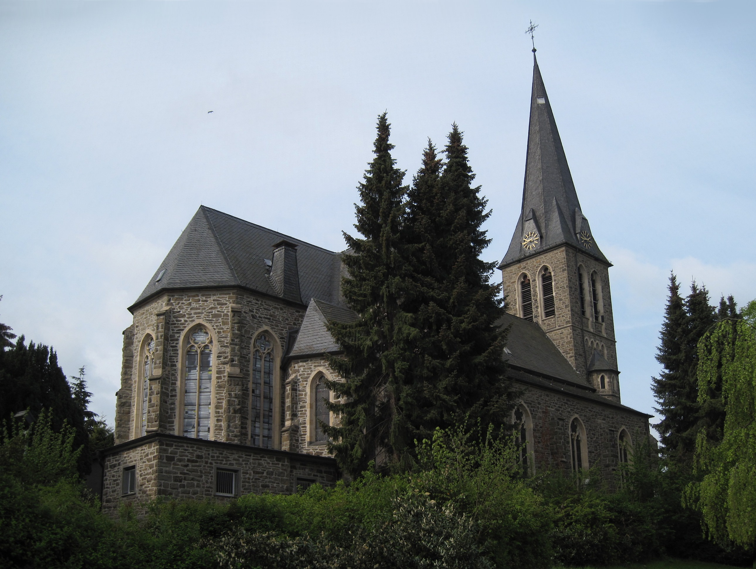 Katholische Kirche St. Bonifatius in Hemer-Sundwig. Denkmal seit 2001.